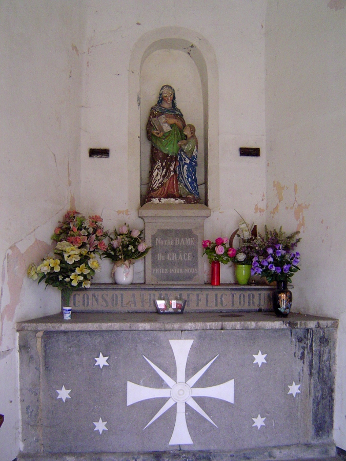 Chapelle dédiée à Marie, au croisement de la rue de Huissignies et de la Chaussée Brunehaut, à Blicquy